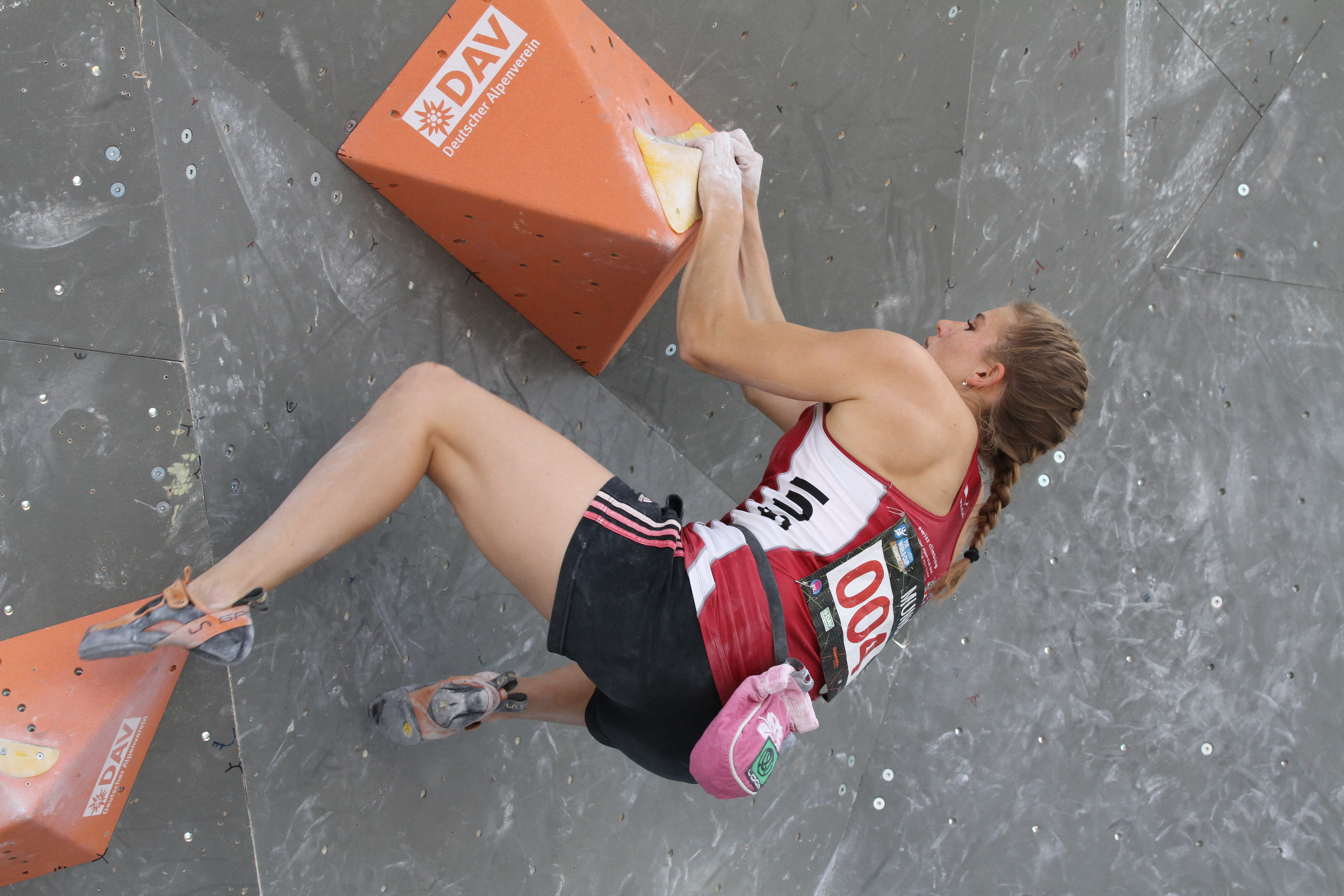 IFSC Boulder Worldcup, Munich 2015. Petra Klingler (SUI)